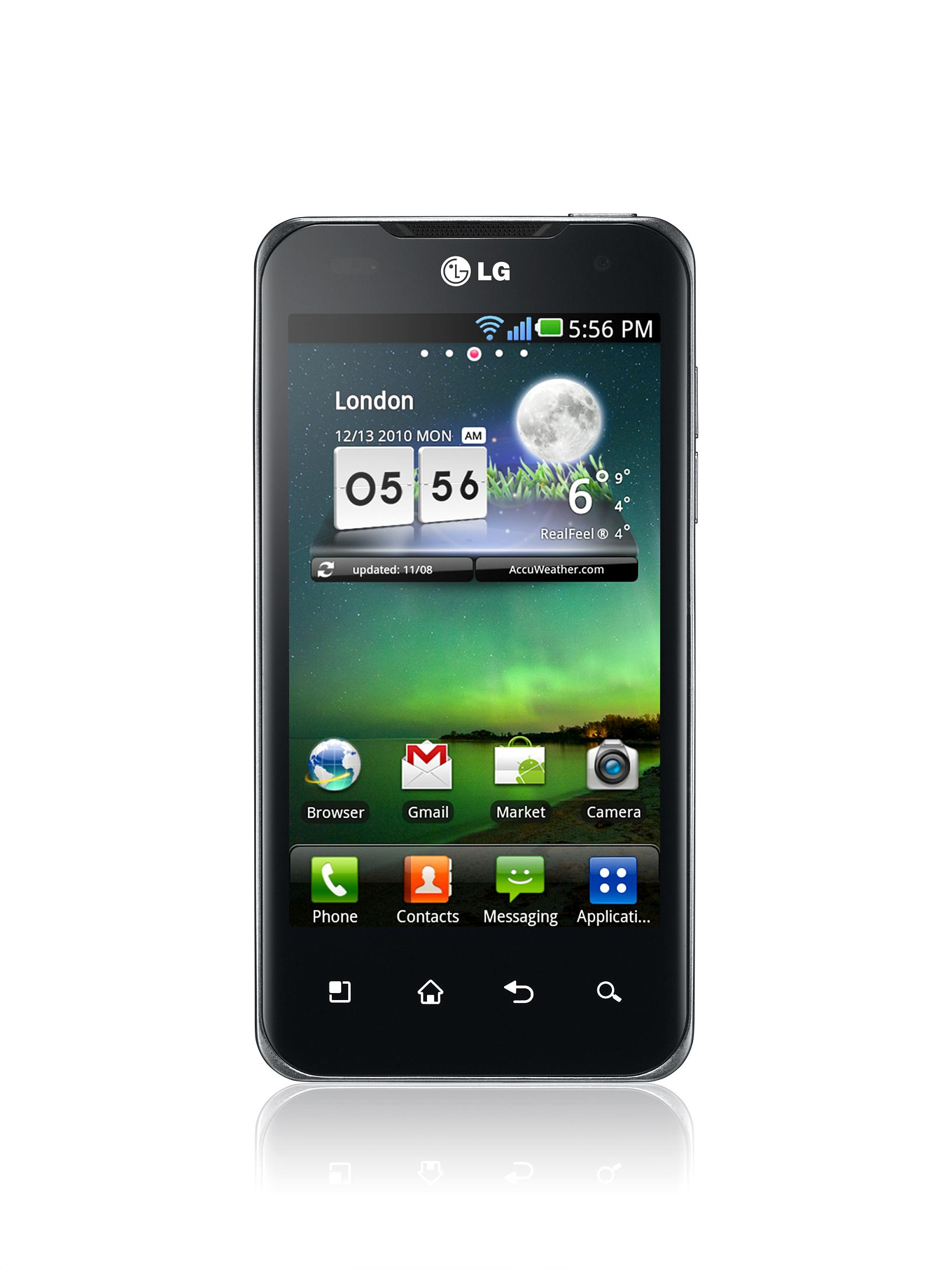 Lg '옵티머스 2x', 유럽 본격 상륙 Lg전자의 세계 최초 듀얼코어 스마트폰 ‘옵티머스 2x(모델명: Lg-p990)'가 한국에 이어 이번주부터 유럽에 상륙한다.